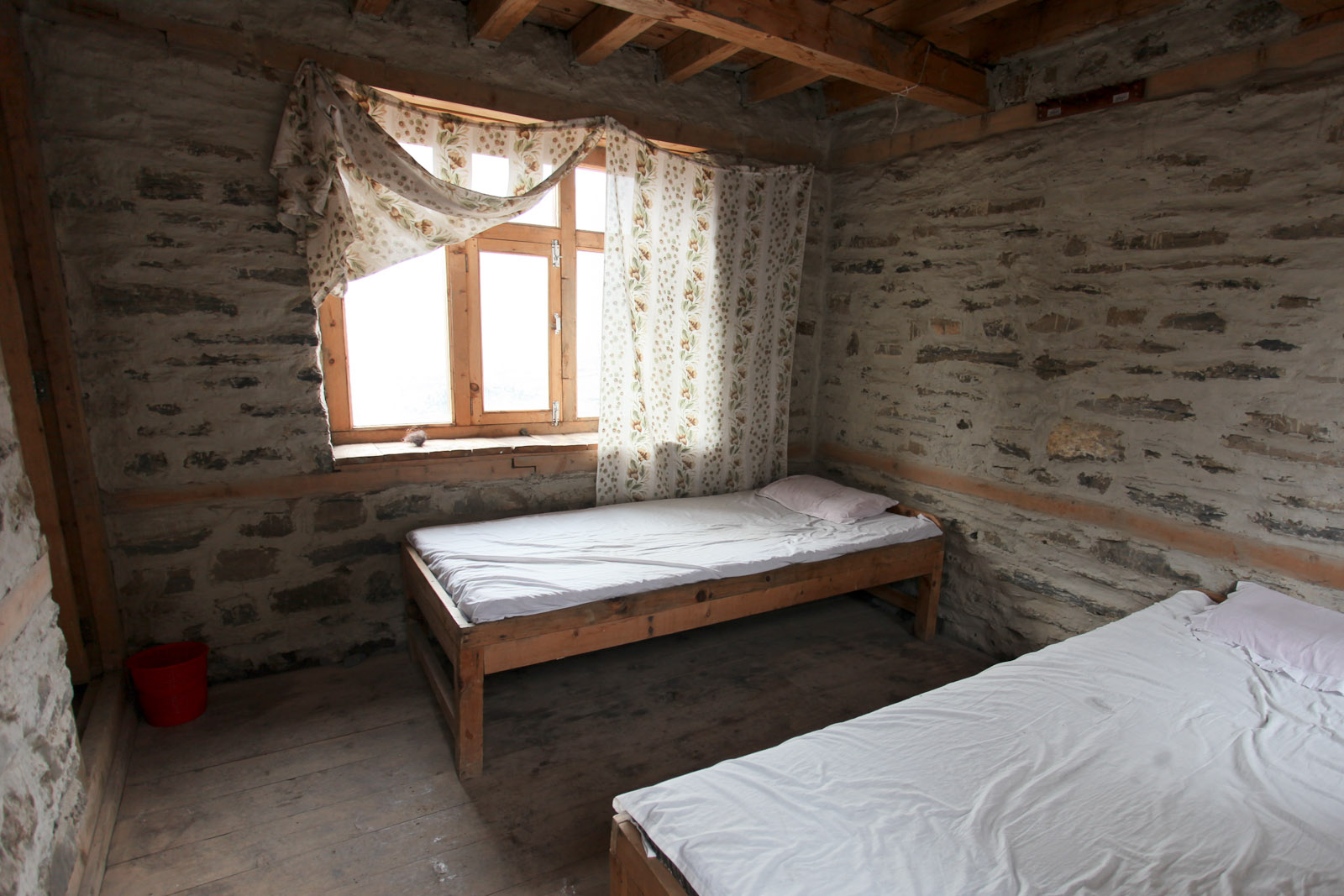 room